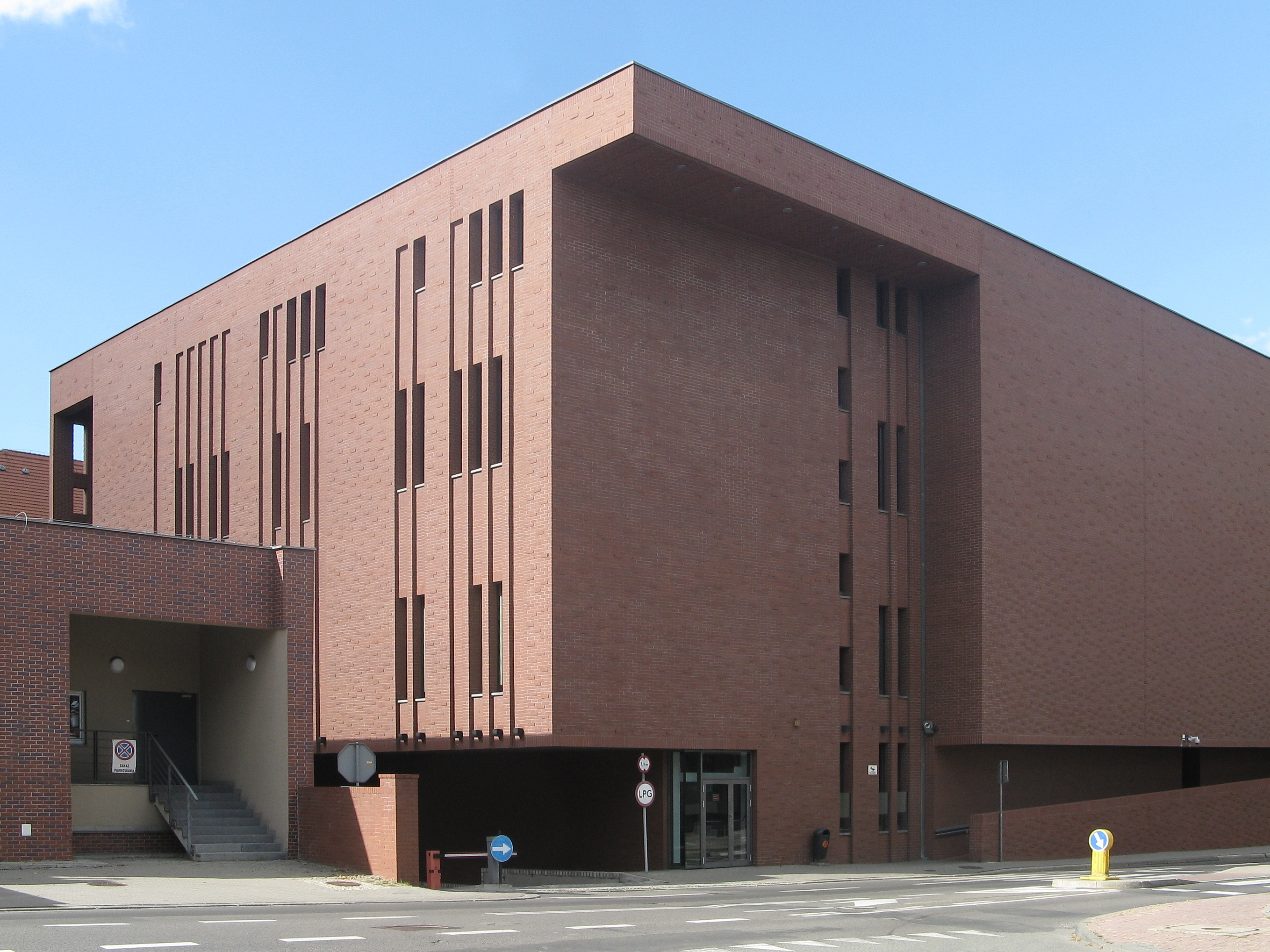 Centrum Nauki i Edukacji Muzycznej Symfonia w Katowicach, Akademia Muzyczna, ul. Zacisze 3, fragment elewacji widziany od strony ul. Konstantego Damrota, projekt: Tomasz Konior.